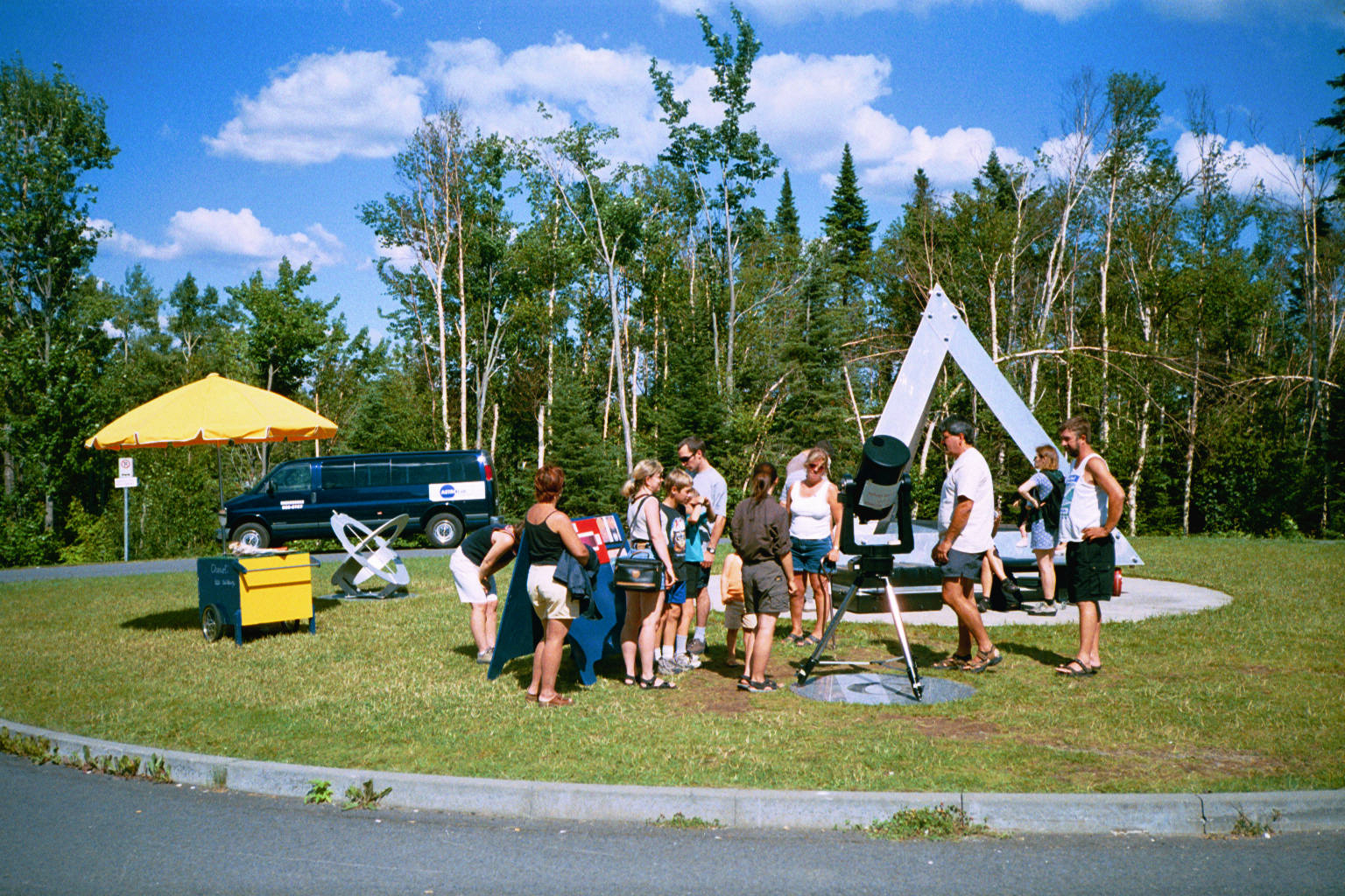 Terrain central face à l'ASTROLab du Parc national du Mont-Mégantic (Québec, Canada).